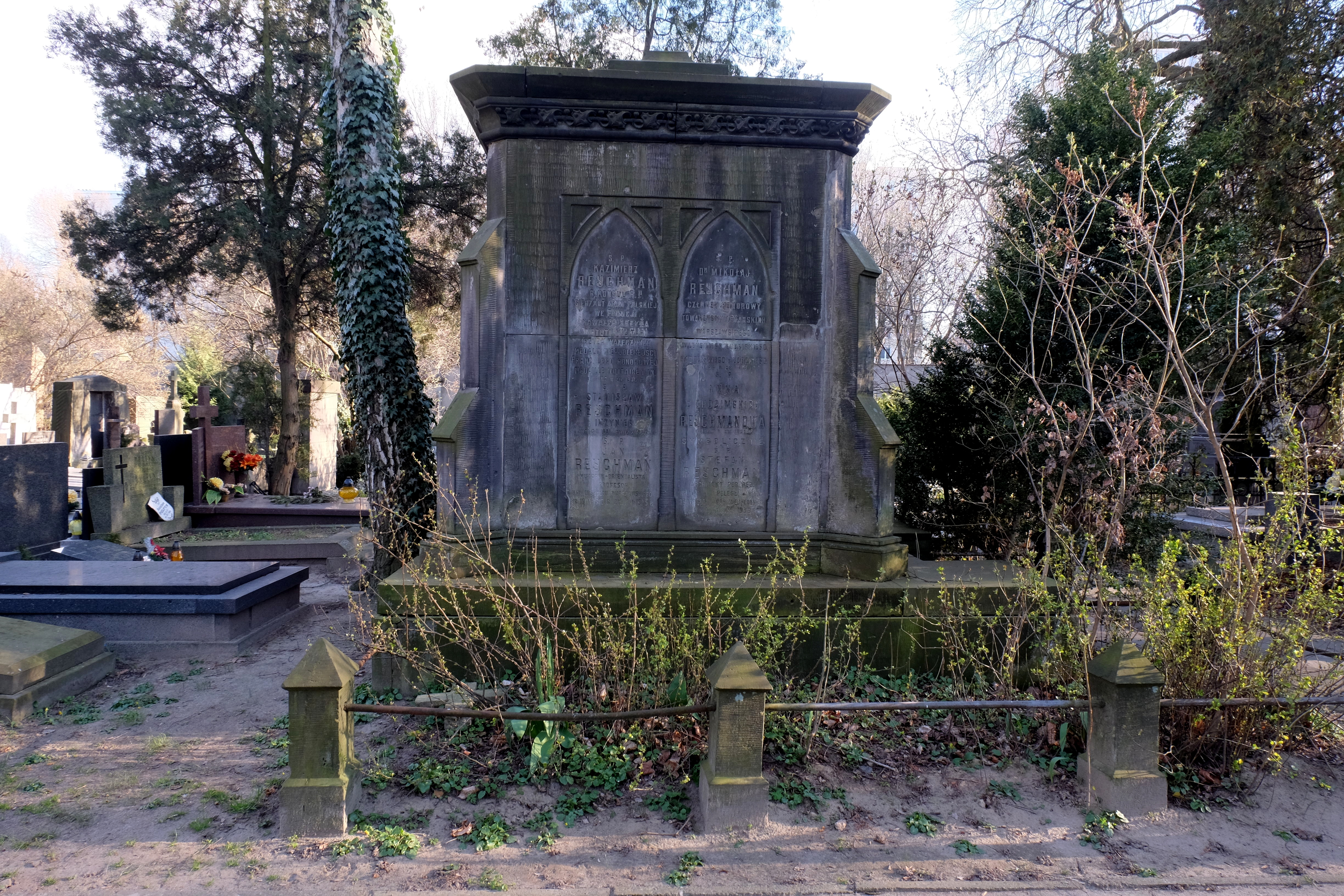 Grób historyka Jana Rejchamana (Reychmana), konsula Kazimierza Rejchmana (Reychmana) oraz lekarza Mikołaja Rejchmana (Rechymana) na cmentarzu ewangelicko-reformowanym przy ul. Żytniej w Warszawie